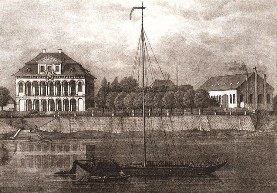 Ausbildungsstätte Maschinenbauanstalt Übigau 1836